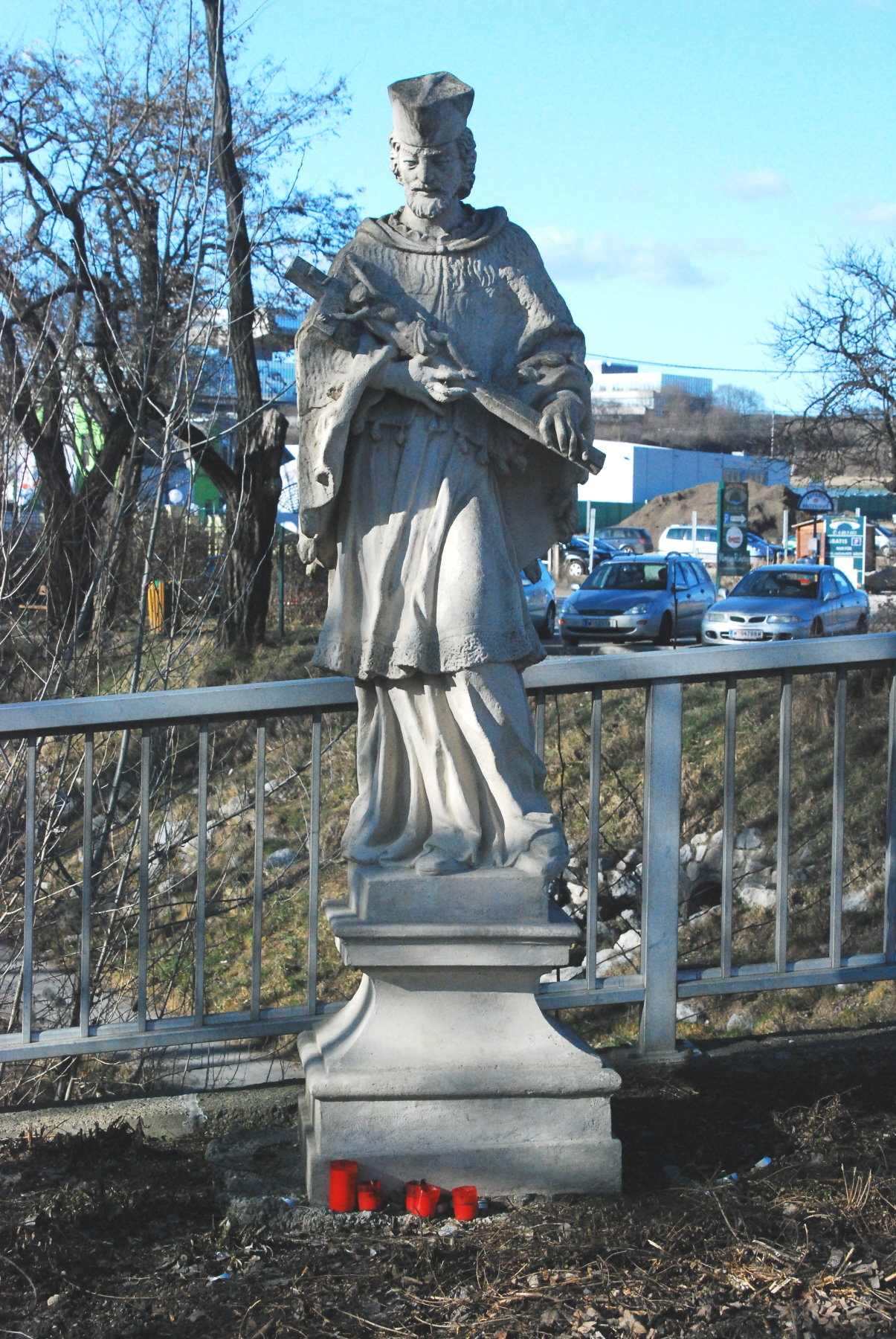 Johann-Nepomuk-Statue an der Liesing-Brücke in Unterlaa (Wien-Favoriten)